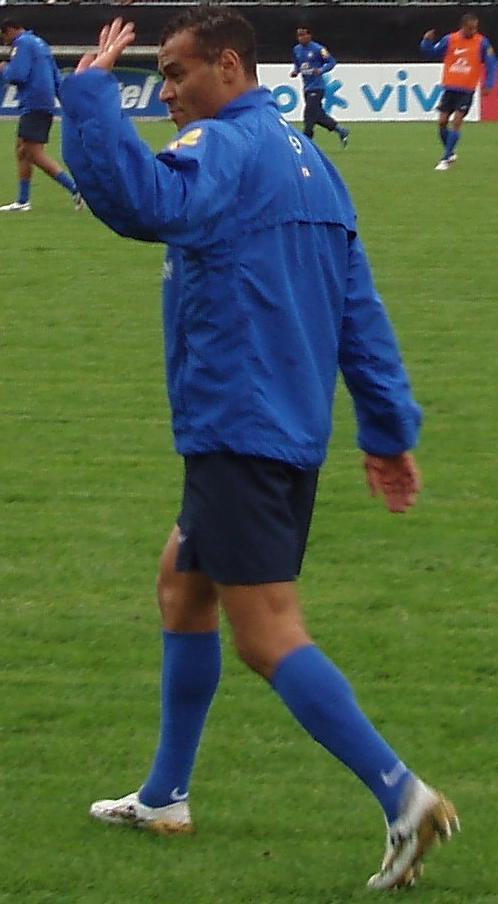 Cafu, Spieler der brasilianischen Fußballnationalmannschaft